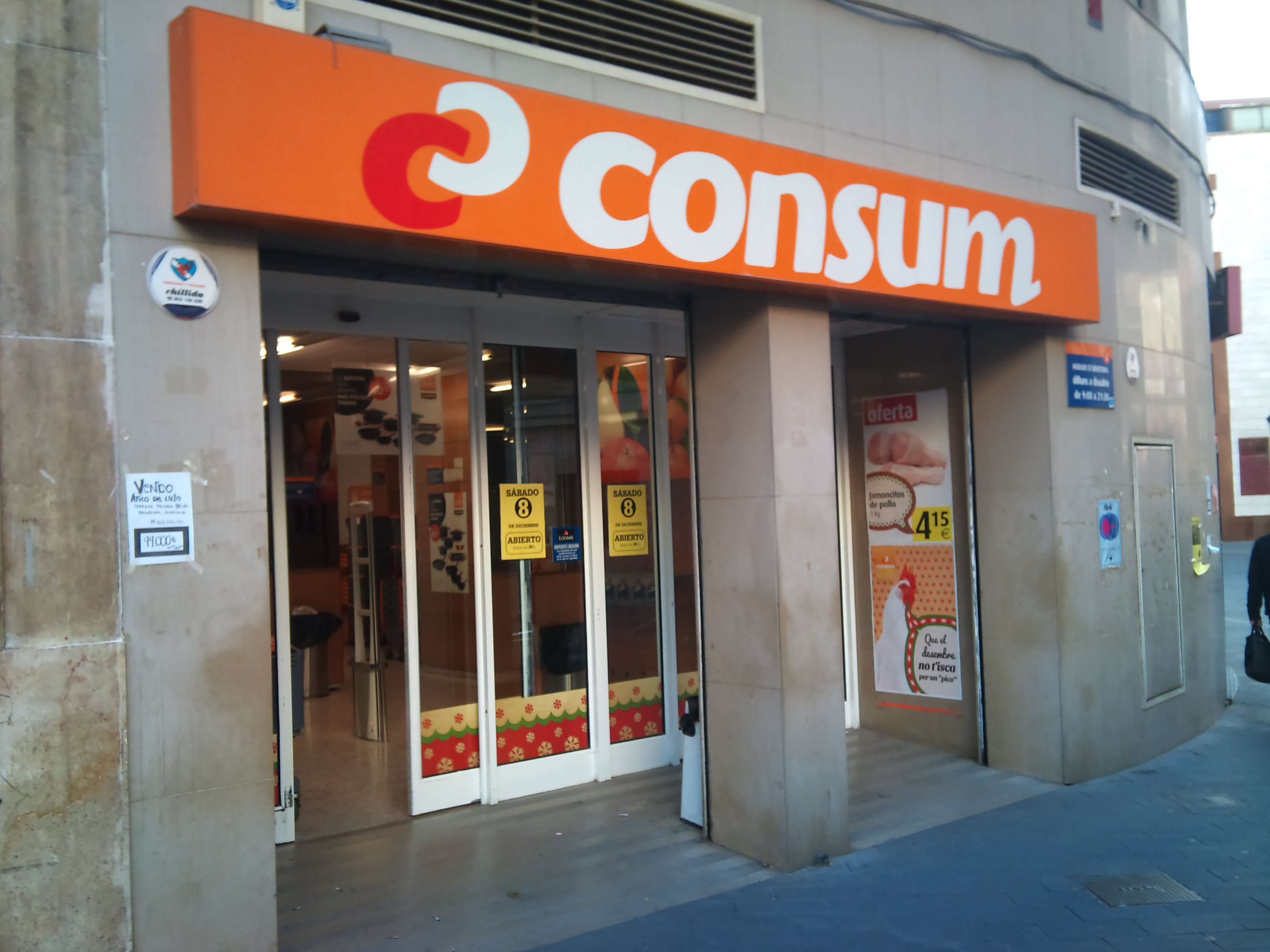 Supermercat a València ciutat.